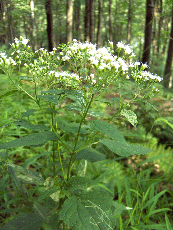 White Snakeroot